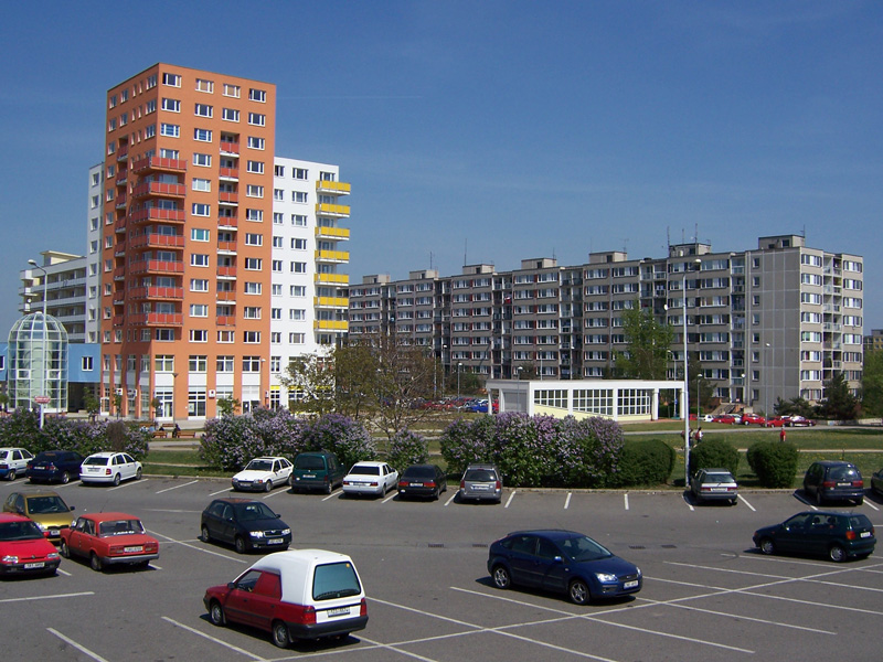 Veronské náměstí, Praha-Horní Měcholupy